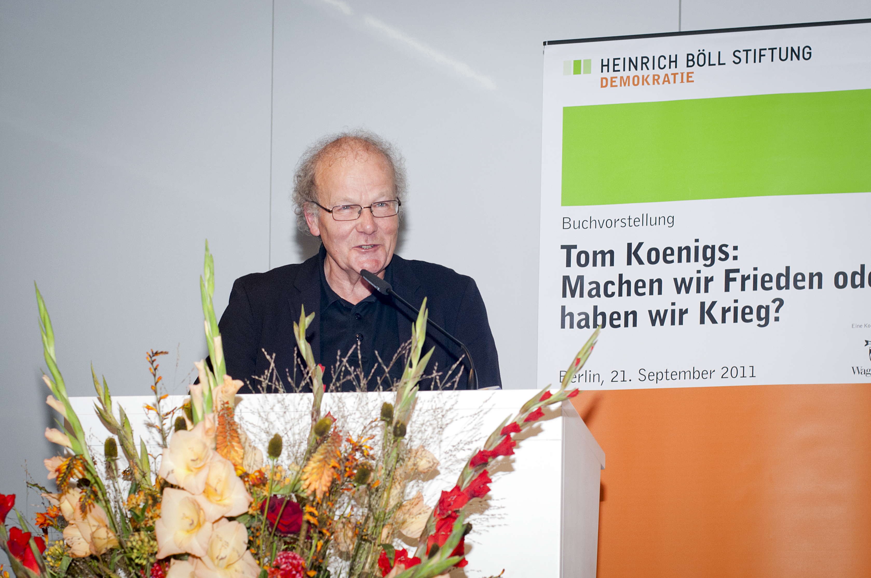 Joscha Schmierer (Publizist) Foto: Isis Martins